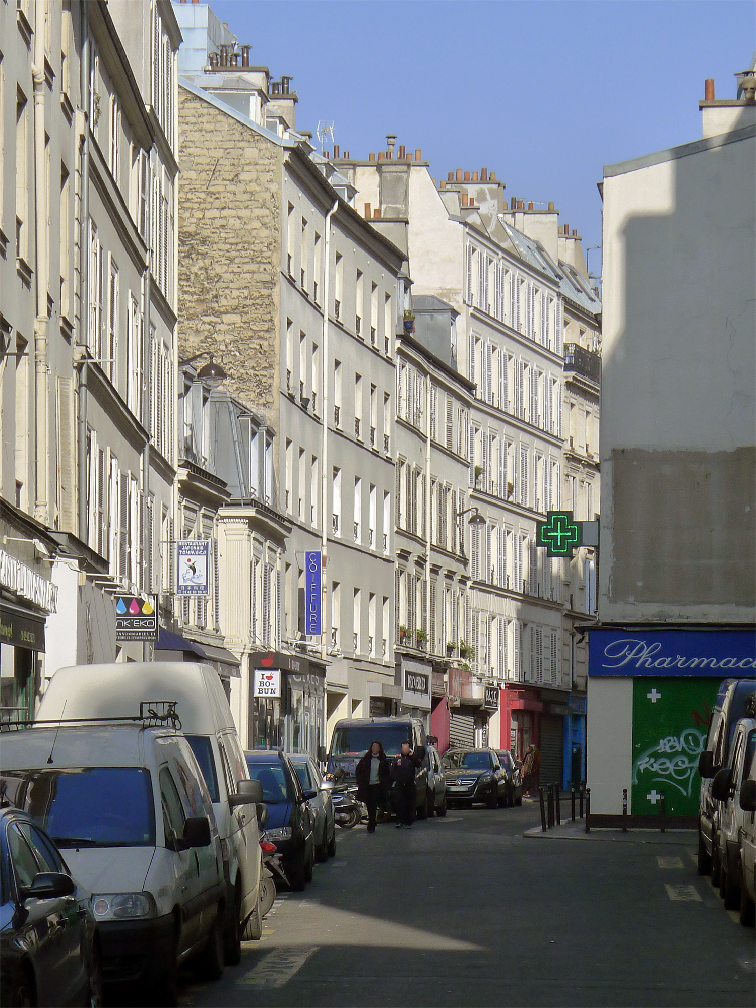 Rue des Dames - Paris XVII